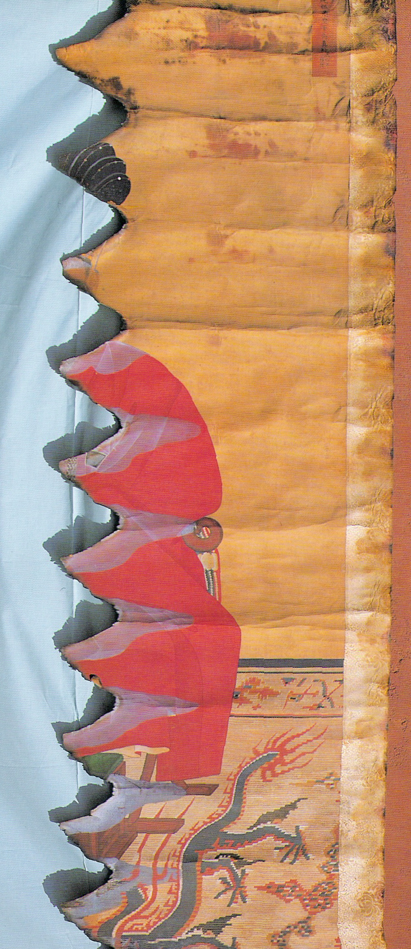 中文（中国大陆）: 朝鲜纯祖御真，半烧。作者去世已经超过100年，作品已经进入公有领域。